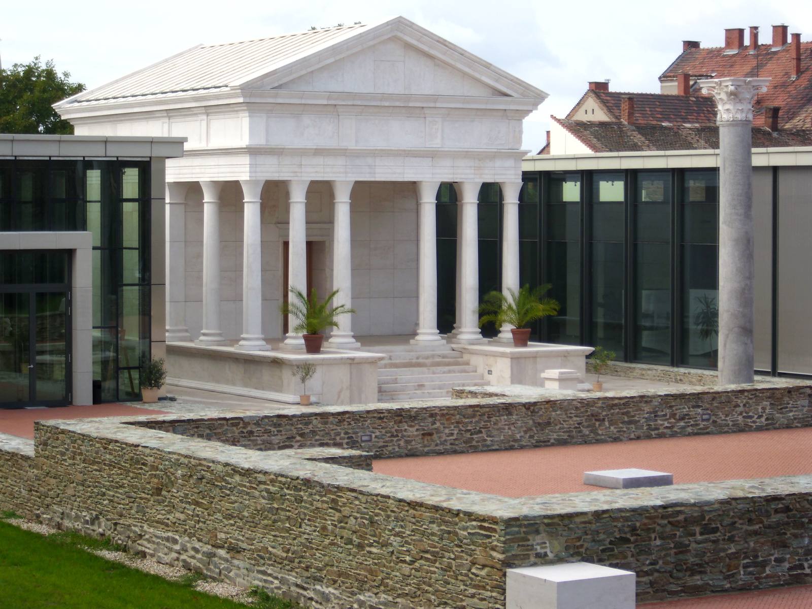 Iseum (Szombathely, Zrínyi Ilona utca 9.) This is a photo of a monument in Hungary, Identifier: 9446